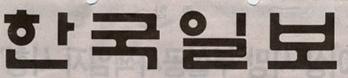 1998년부터 가로쓰기 단행 시작했으며, 2002년까지 한국일보 로고로 사용되었음.